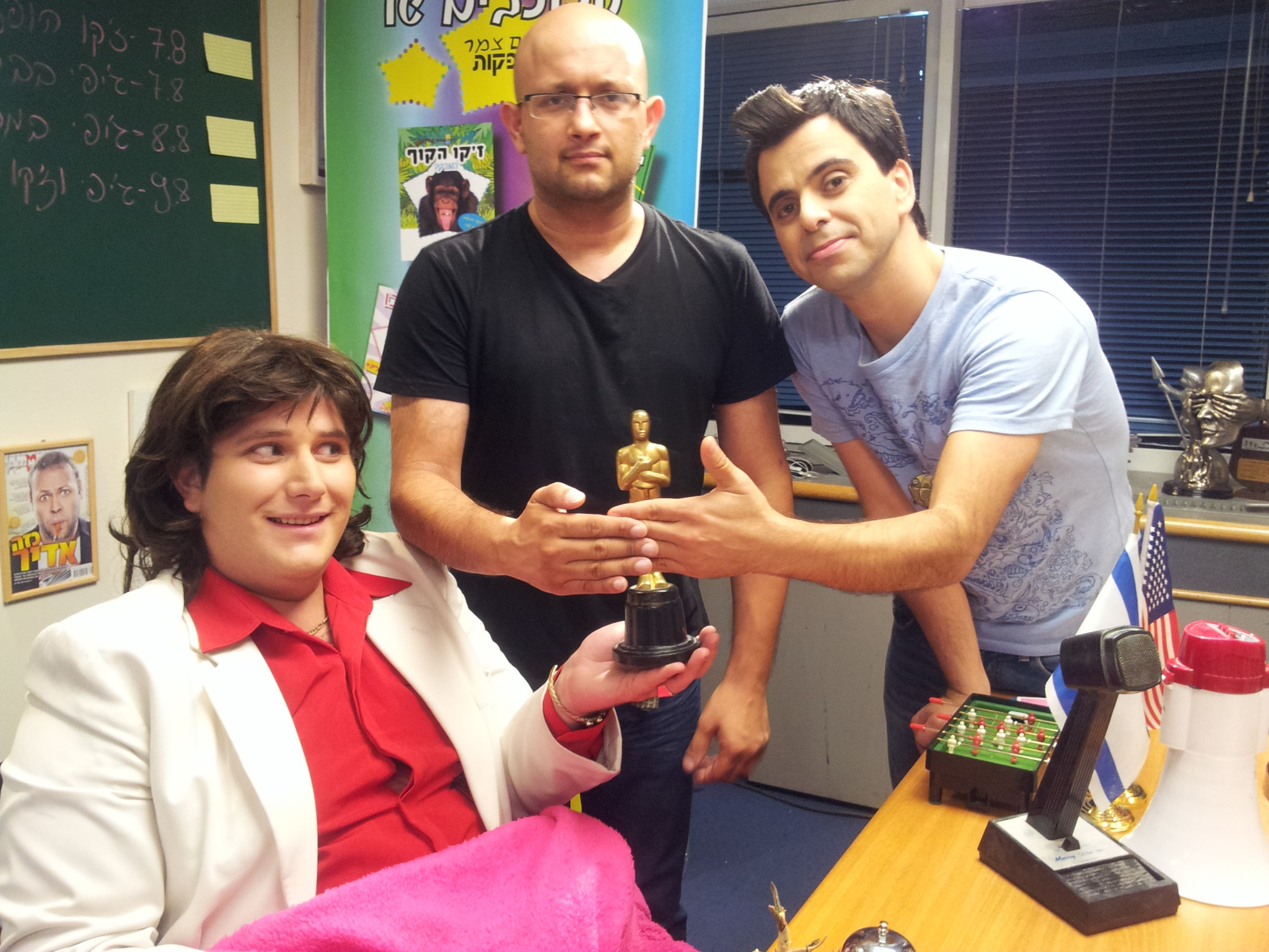 עמי'לה -עמי אנידג'ר, אלאלון גור אריה, שראל פיטמרן